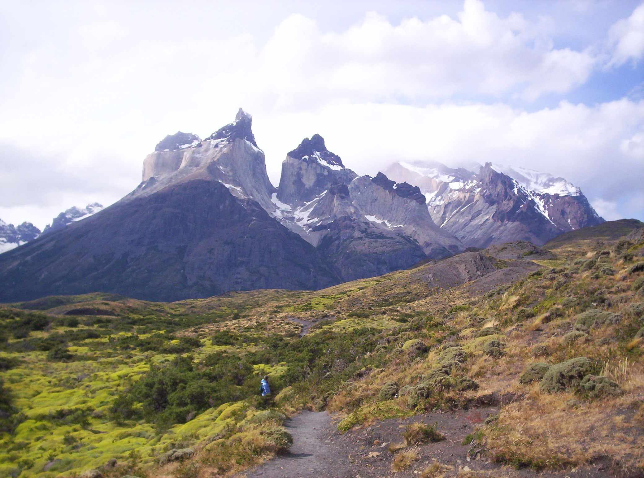 Foto de los Cuernos del Paine, Chile.